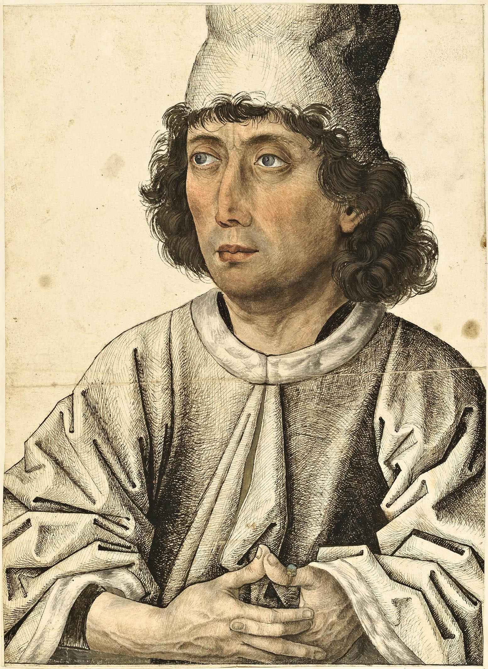 Süddeutsch (Bayern ?), um 1470/80 Meister des Mornauer Bildnisses: Bildnis eines jungen Mannes. aus dem "Kleinen Klebeband" des Maximilian Willibald von Waldburg-Wolfegg,bis 2011 in der Sammlung der Fürsten von Waldburg-Wolfegg auf Schloss Wolfegg (Kreis Ravensburg), seit 2011 Eigentum des Kupferstichkabinetts - Staatliche Museen zu Berlin, Preußischer Kulturbesitz, der Kunstsammlungen und Museen Augsburg, der Ernst von Siemens Kunststiftung und des Freistaates Bayern; erworben mit Unterstützung der Kulturstiftung der Länder und der Rudolf-August Oetker Stiftung für Kunst, Kultur, Wissenschaft und Denkmalpflege